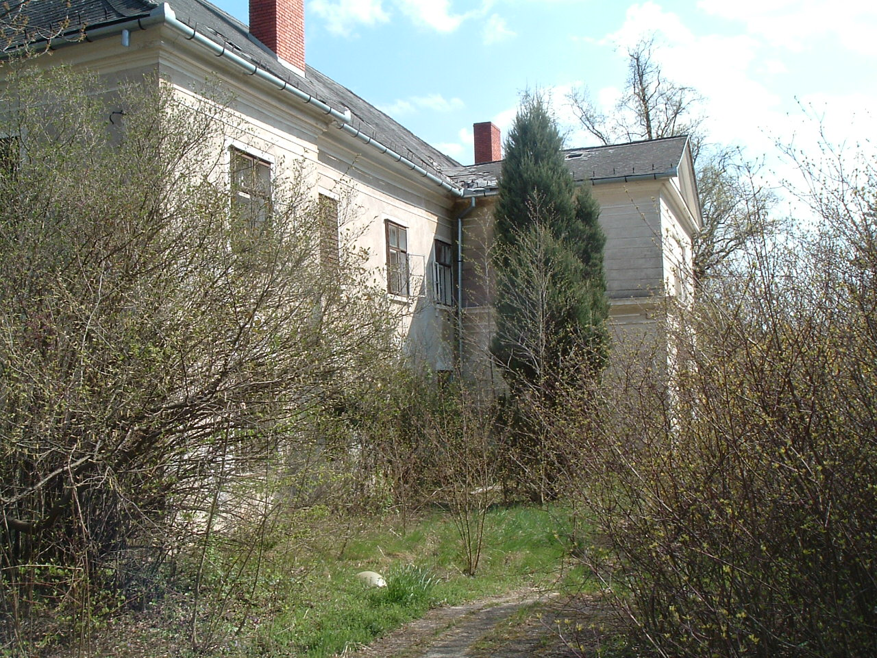 Gyöngyöshermán, Szegedy manor-house